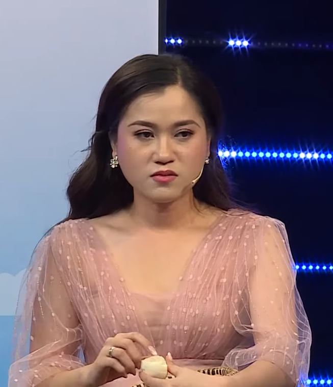 Lâm Vỹ Dạ, ảnh chụp màn hình từ video của BEE Entertainment / Giải Trí (screen capture from video of BEE Entertainment / Giải Trí).